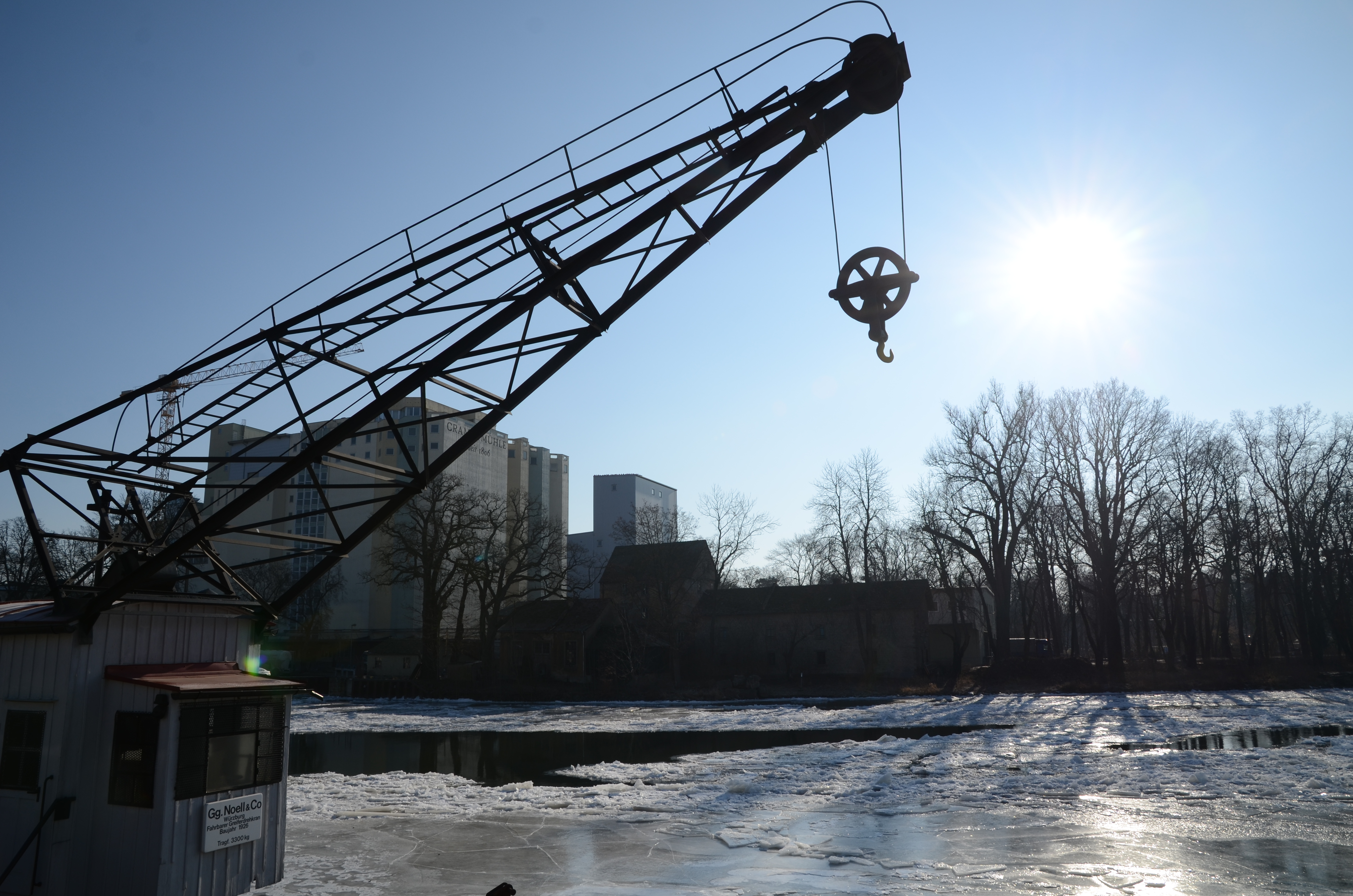 Schweinfurt, Guttermannpromenade 11, Elektrokran